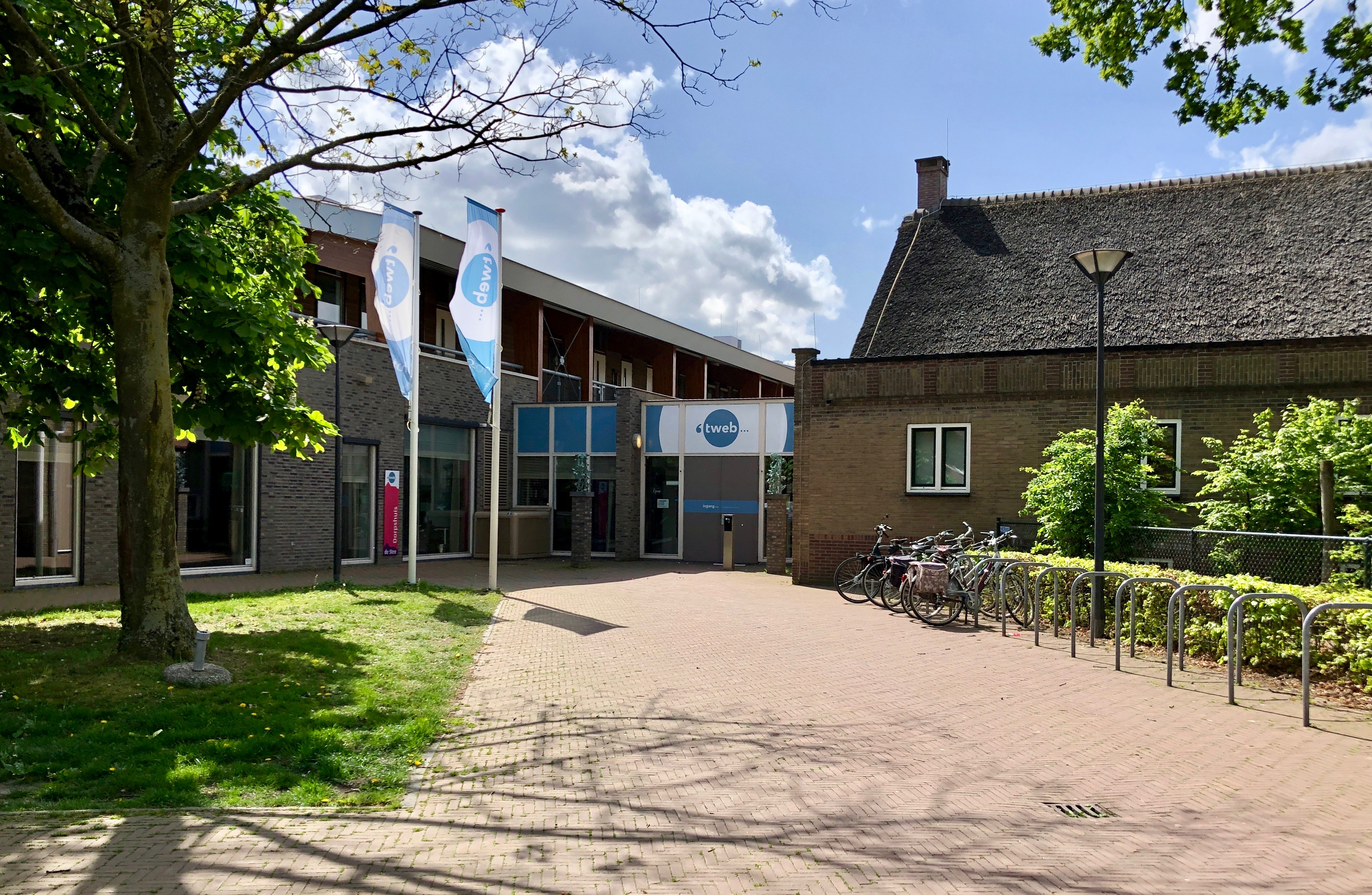 Zicht op een deel van het vernieuwde Dorpshuis 't Web, Zuringveld 1, 4847 KS Teteringen